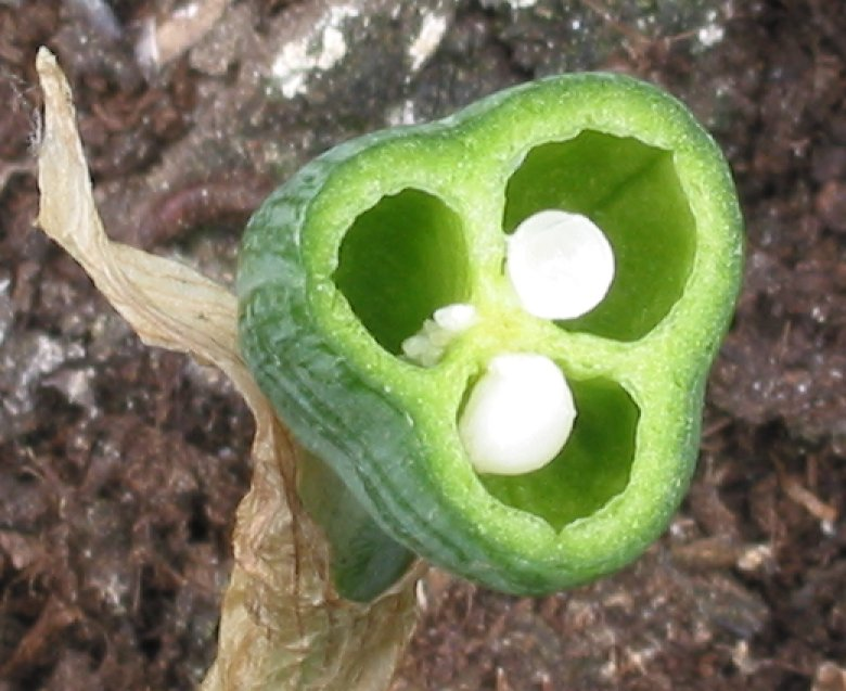 zelfgemaakte foto; dwarsdoorsnede vruchtbeginsel Narcis Cross seection of the ovary of Narcissus